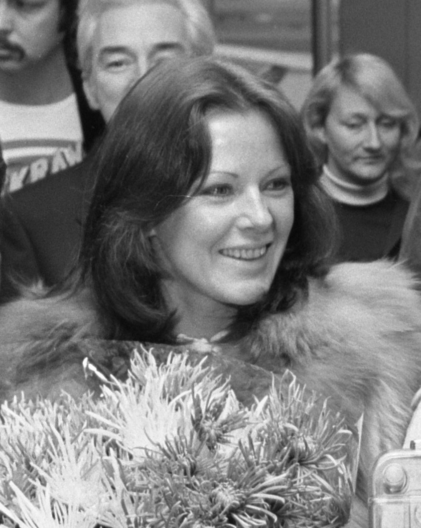 Frida Lyngstad en Benny Andersson in Nederland